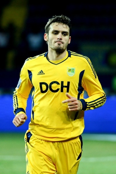 В матче с ФК Таврия